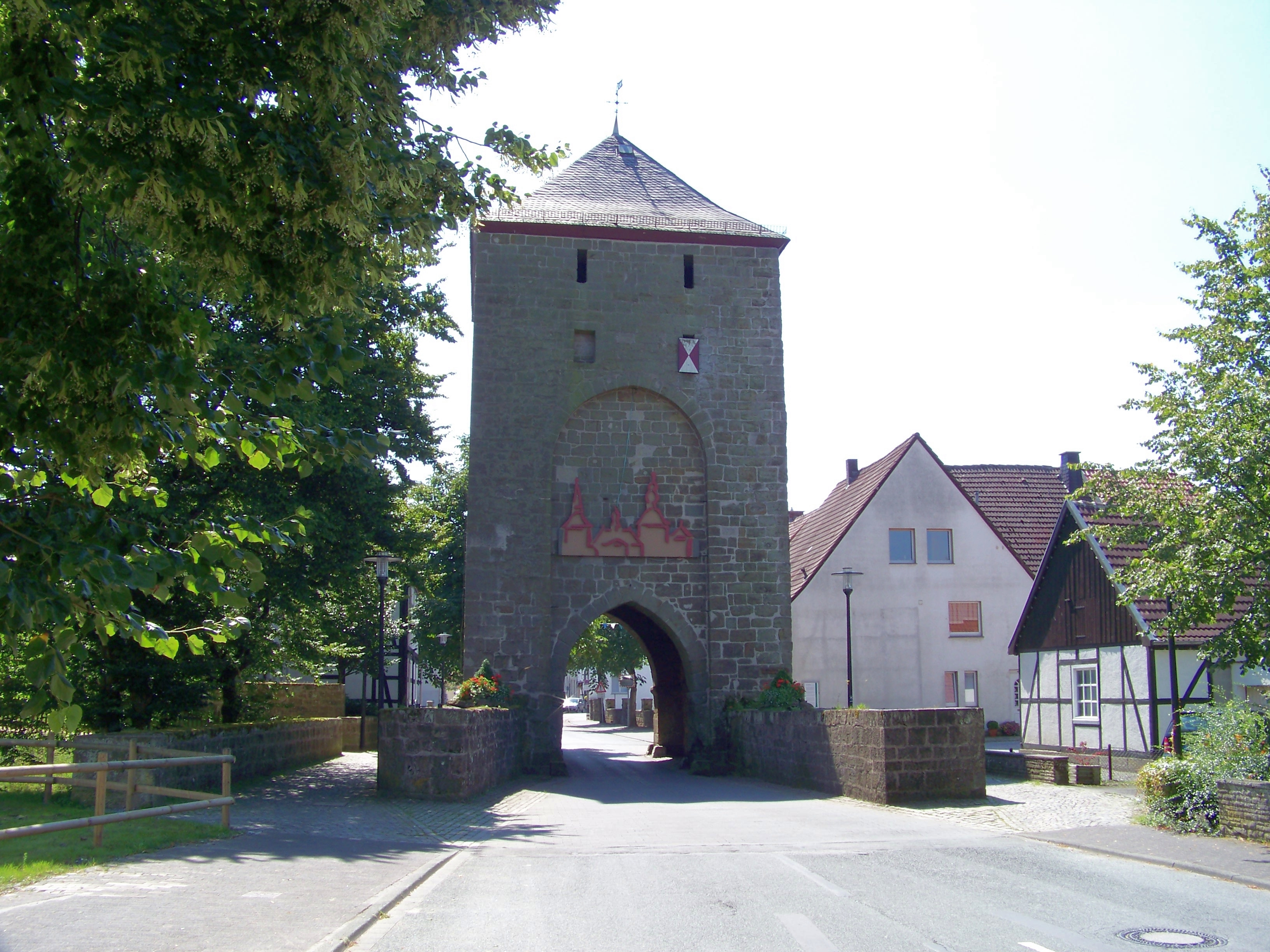 Hachtor in Rüthen, Wappen (Germany)